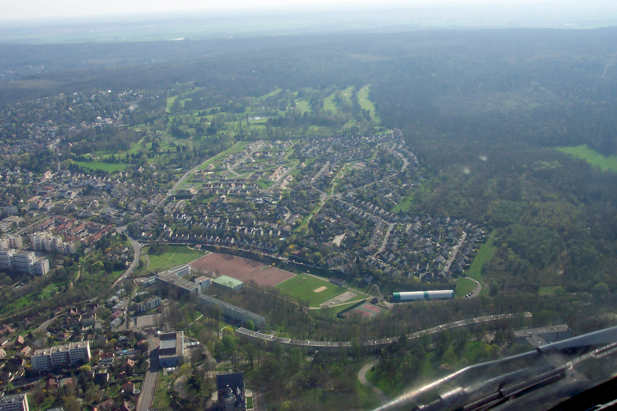 Extension pavillonnaire d'une commune de la banlieue sud-ouest parisienne, dans les Yvelines. Photo prise par Medy Sejai le 3 avril 2005 lors d'un survol en hélicoptère. Urban sprawl of Paris suburbs (SW) near Versailles. Photo taken by Medy Sejai on april 3rd, 2005.